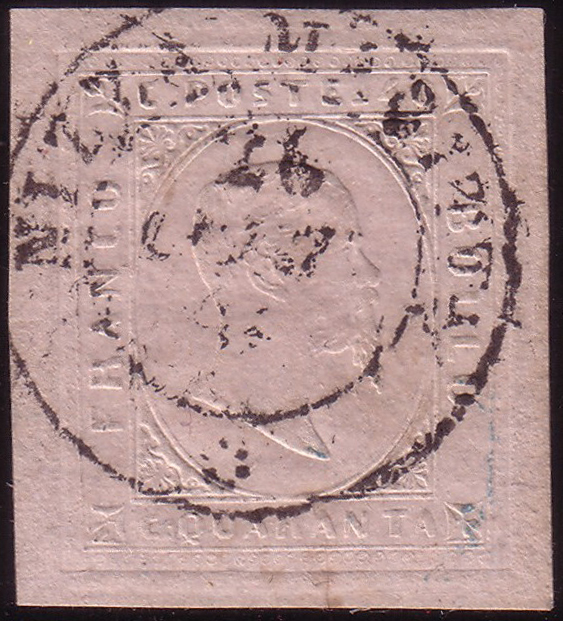 Почтовая марка Сардинского королевства из второго выпуска